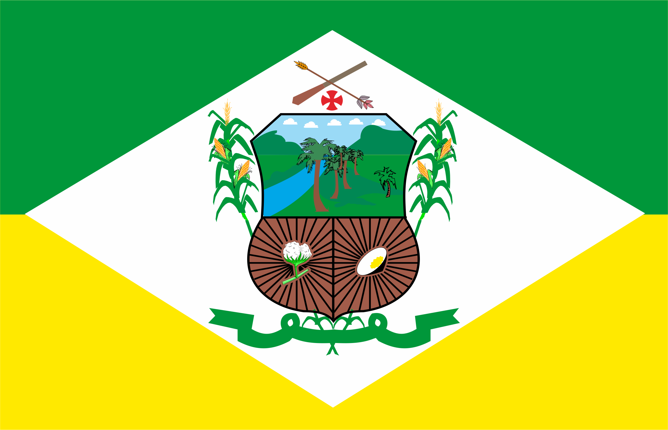 Bandeira de Parelhas, estado do Rio Grande do Norte, Brasil.